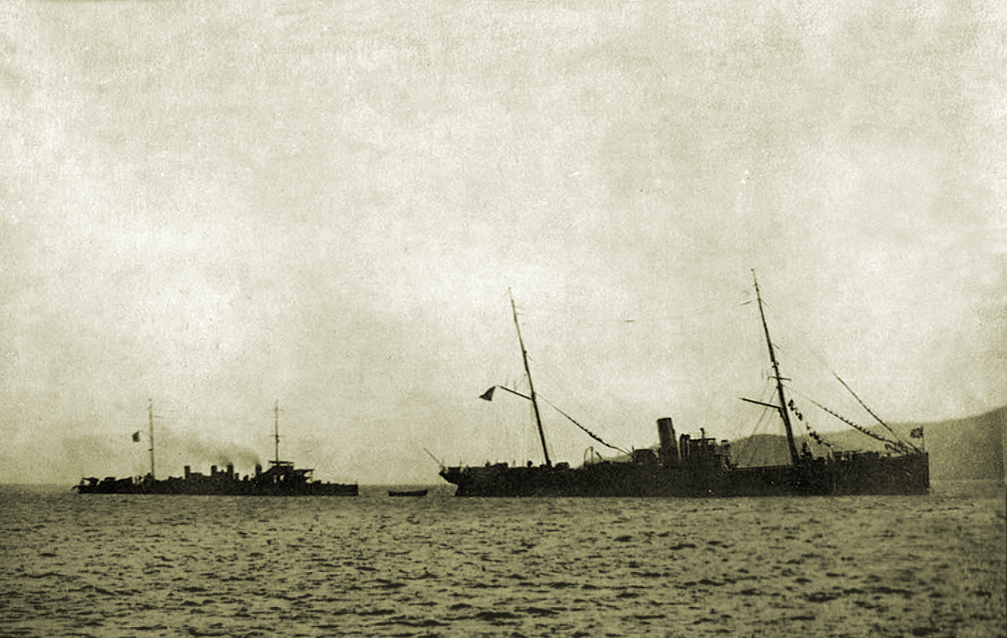 Судно учебного отряда "Якут" и миноносец "Лейтенант Малеев"в бухте Находка, 1919 год